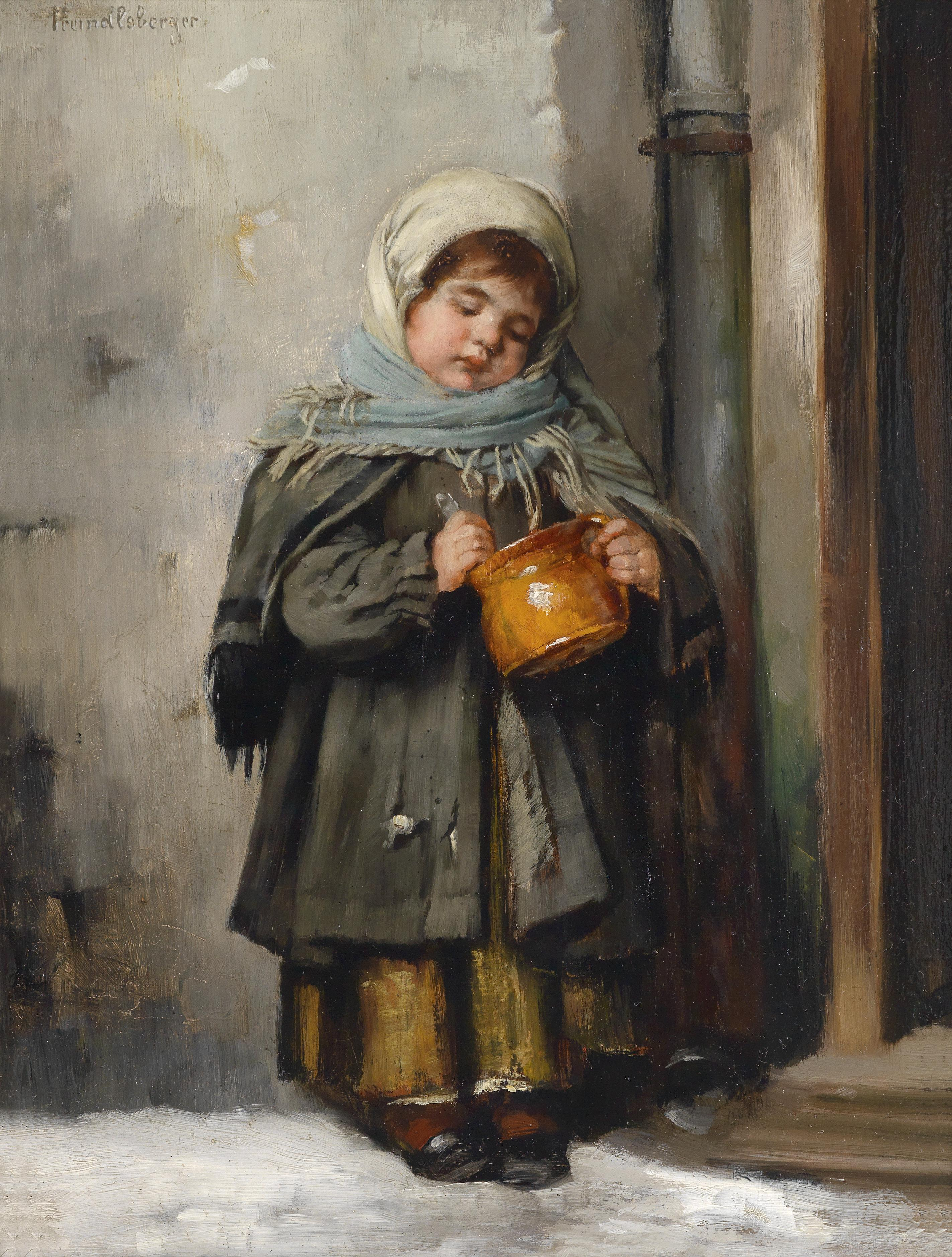 Der Milchtopf.